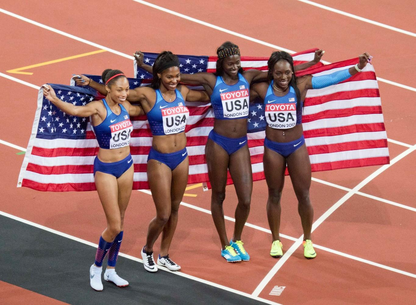 d8_76027 4x100m dames